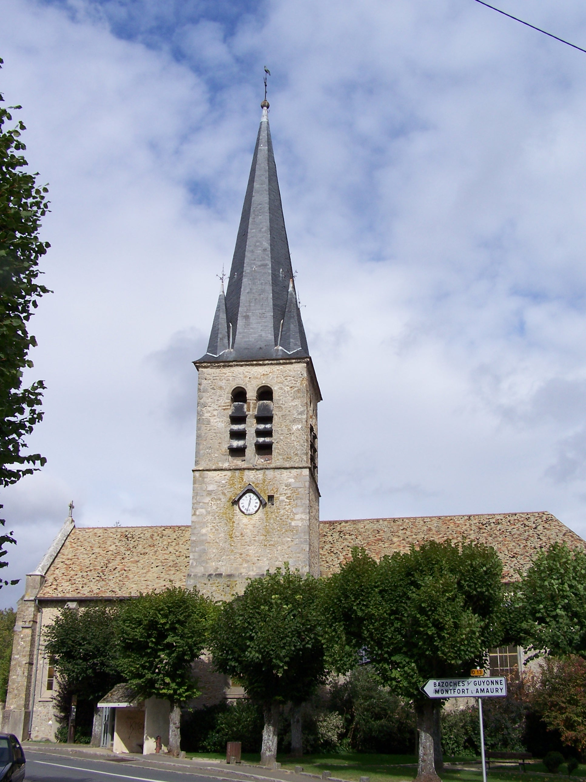 Église du Tremblay-sur-Mauldre (Yvelines, France)